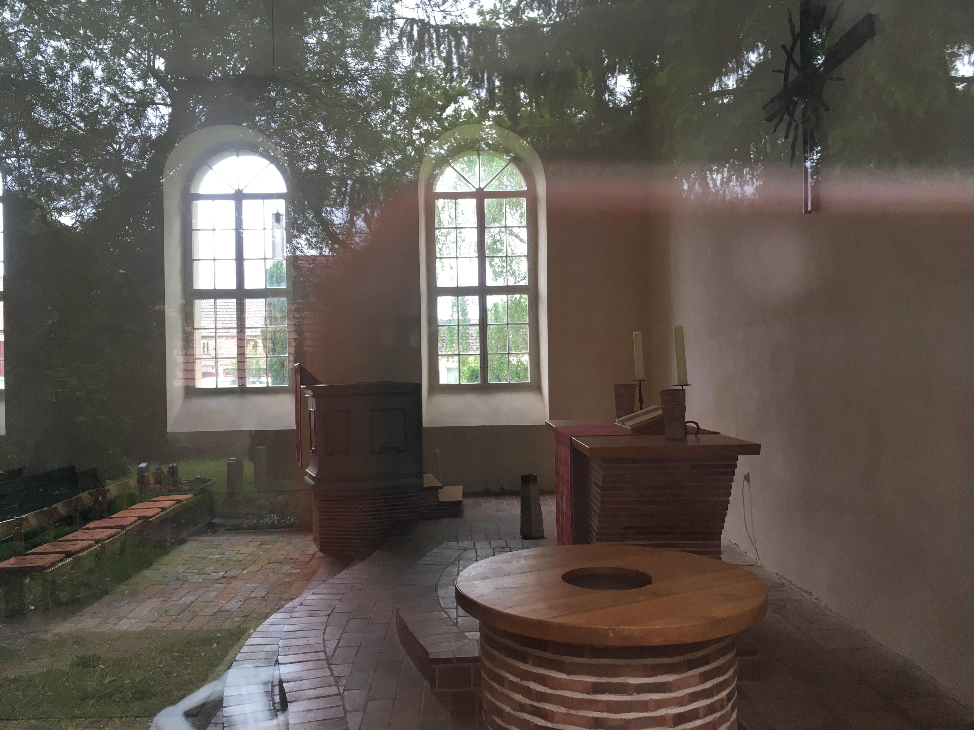 Die Dorfkirche Langerwisch ist eine spätbarocke Feldsteinkirche in Langerwisch, einem Ortsteil von Michendorf im Landkreis Potsdam-Mittelmark. Die Ausstattung wurde in den Jahren 1956 und 1957 vom Architekten Winfried Wendland umgestaltet.